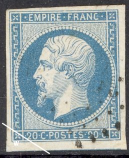 France stamp / Empire, Napoleon III (1854)